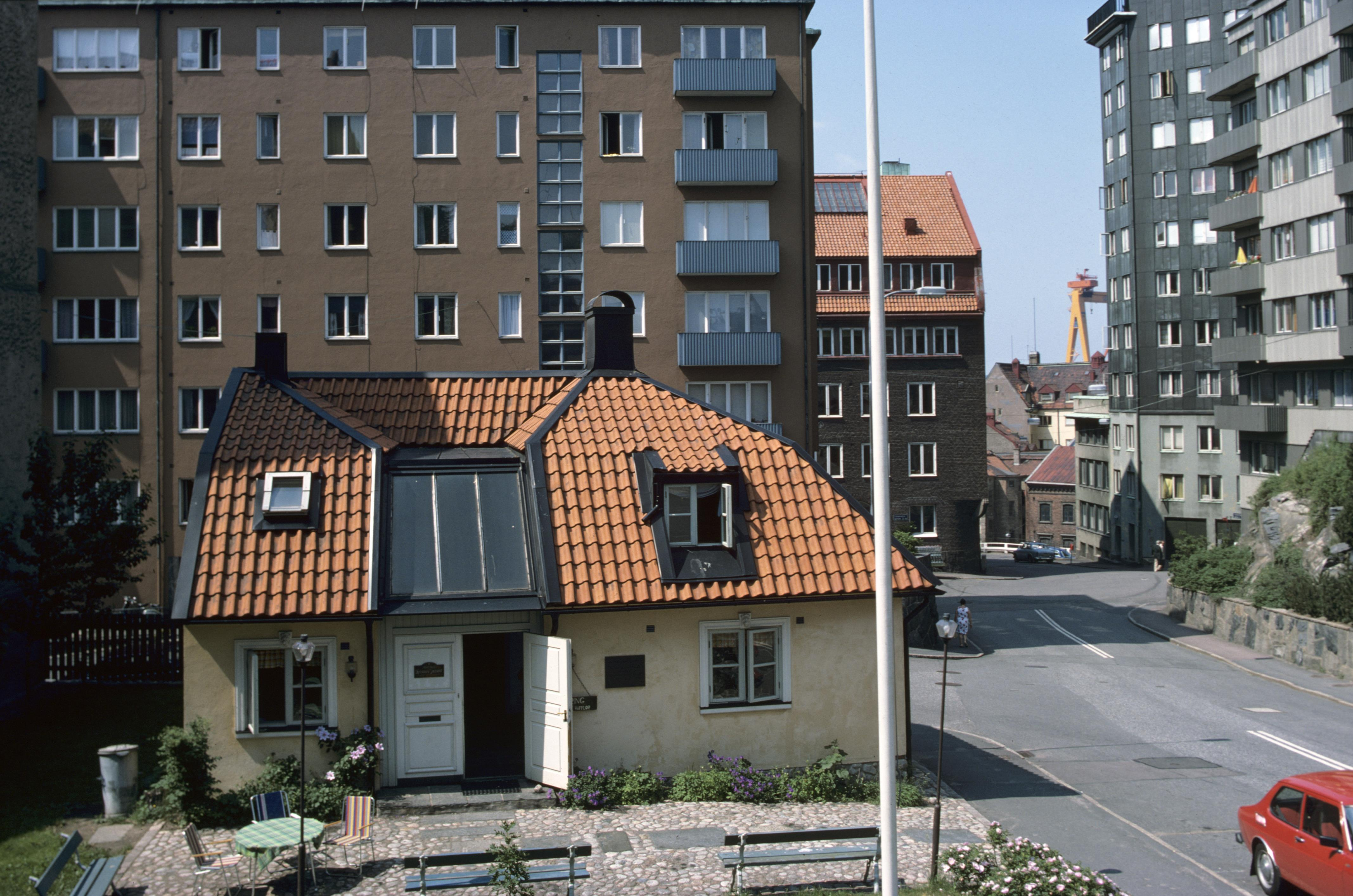 Huset med omgivande höghus. Motiv: Drottning Kristinas Jaktslott Nyckelord: Byggnadsminnen, Riksintressen Kategori: Stadsmiljö, Bostadshus Huset med omgivande höghus.